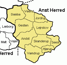 Andst Herred Ribe Amt, Denmark